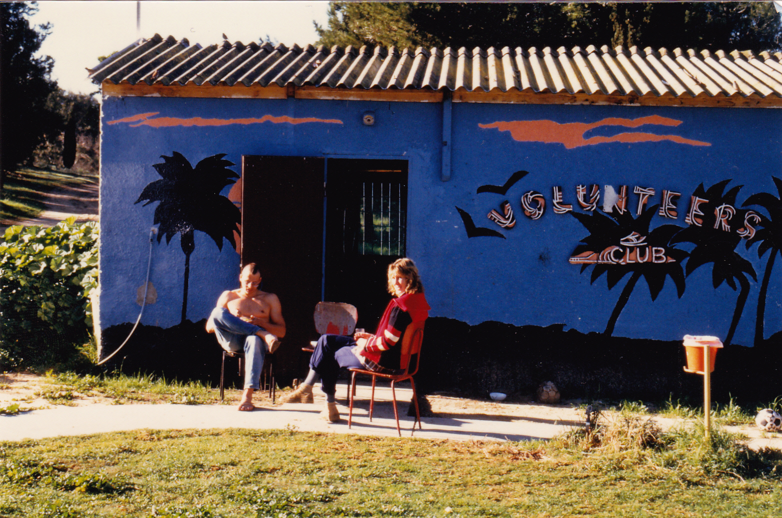 Volunteerscamp im Kibbuz Jad Mordechai 1987